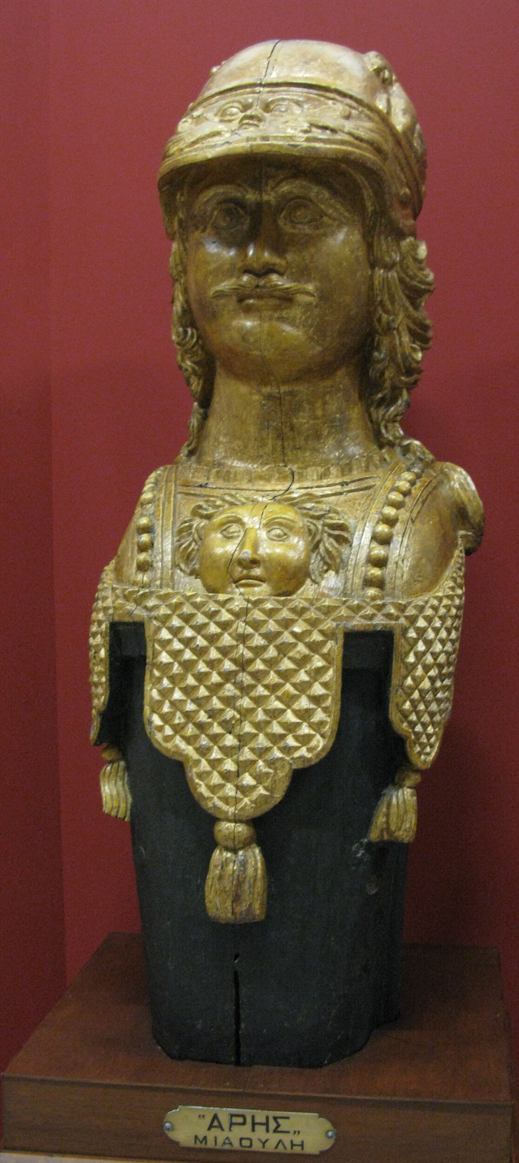 Figurehead of Andreas Miaoulis' vessel Aris. National Historical Museum, Athens, Greece --- Ακρόπρωρο του πλοίου Άρης του Ανδρέα Μιαούλη. Εθνικό Ιστορικό Μουσείο. Αθήνα.